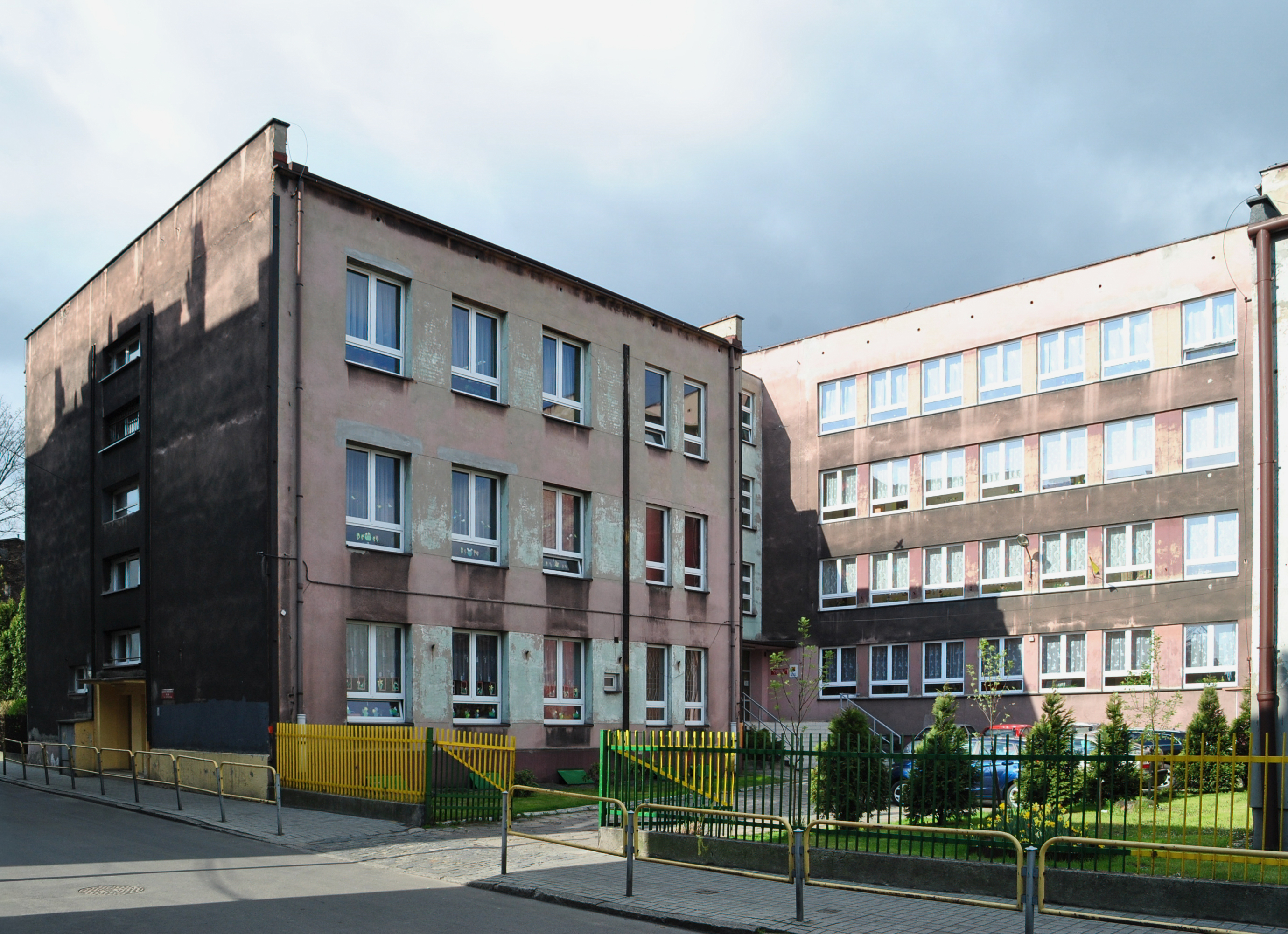 Katowice - Załęże. Budynek Szkoły Podstawowej nr 20 im. Tadeusza Rejtana przy ul. Zarębskiego 2